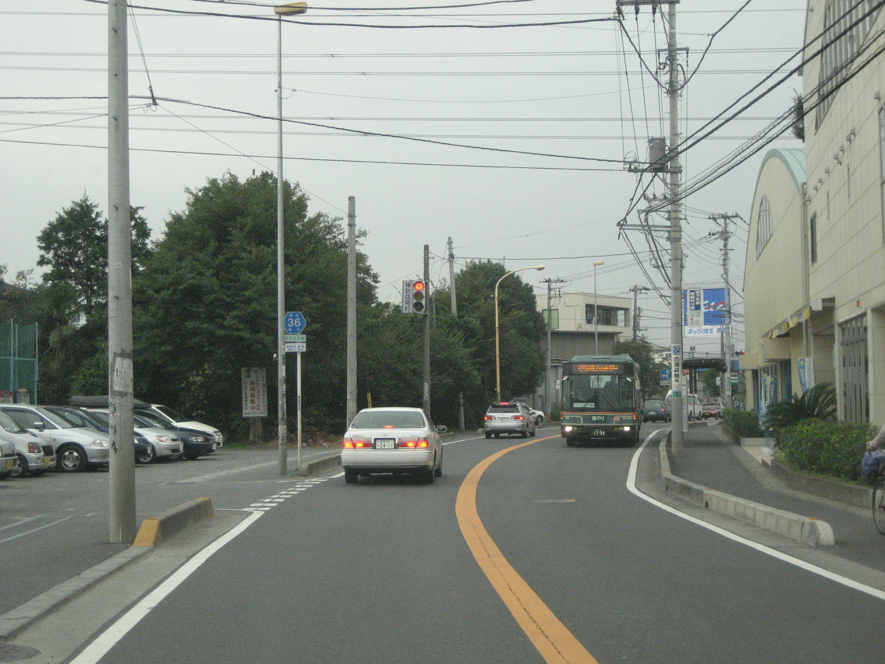 埼玉県道36号線、新座市